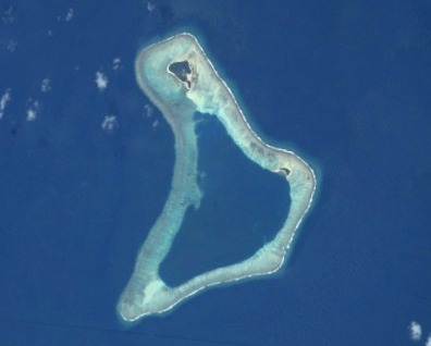 NASA picture